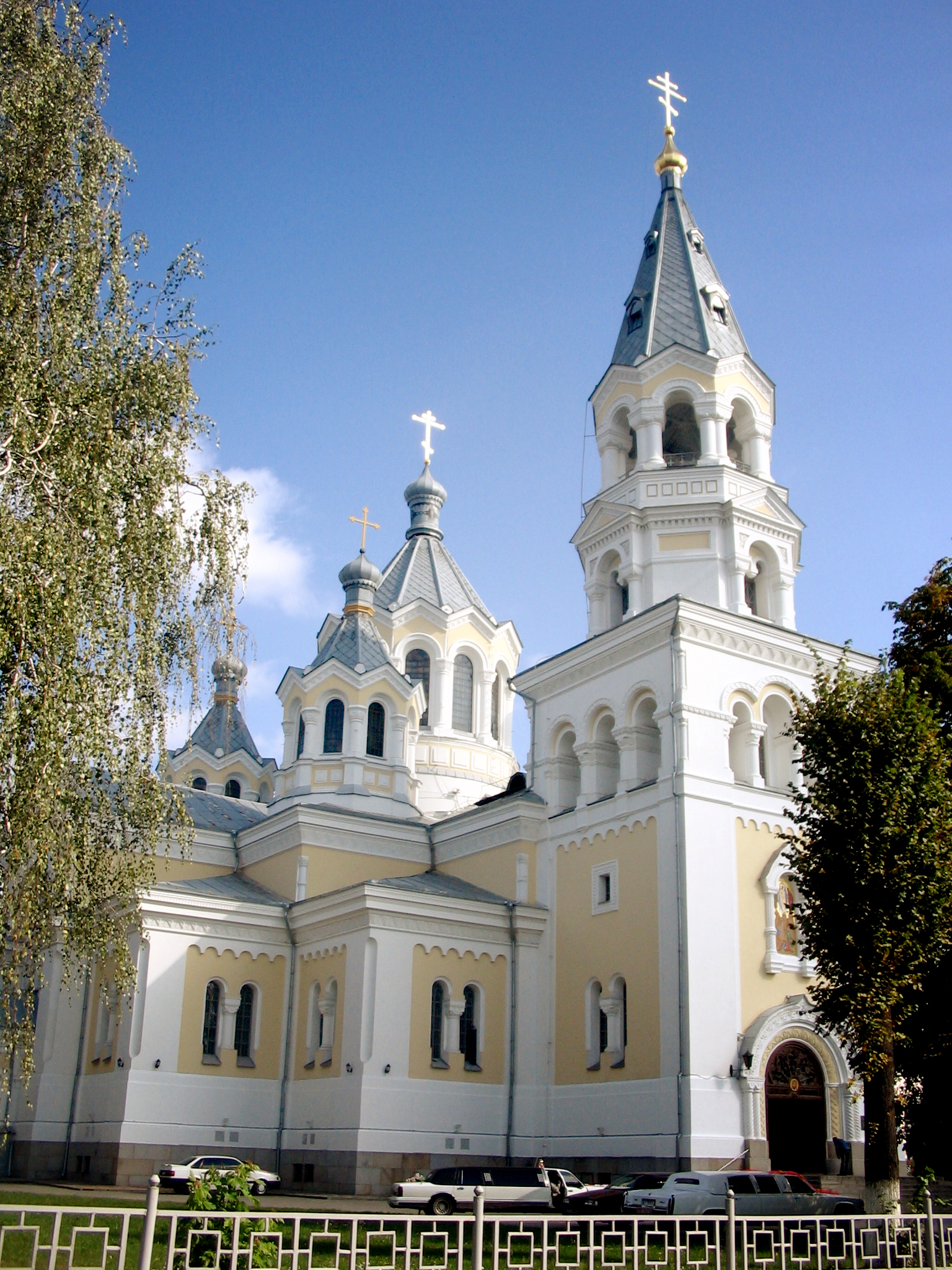 Свято-Преображенський кафедральний собор в м. Житомир